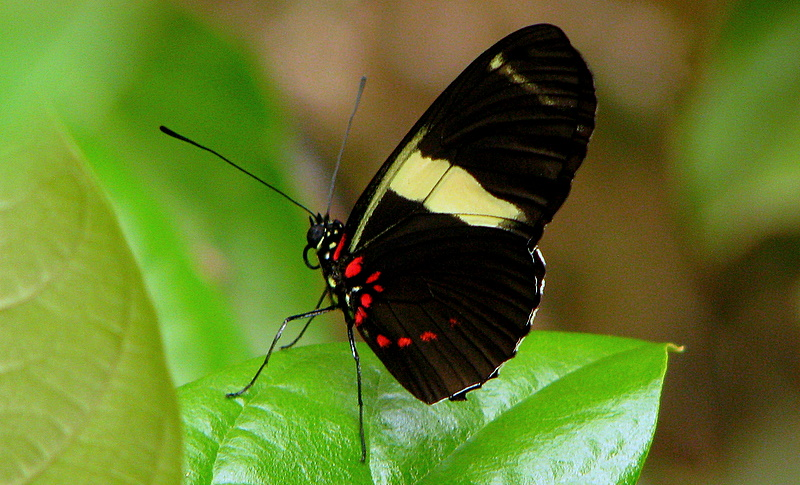 Heliconius sara (Fabricius, 1793)